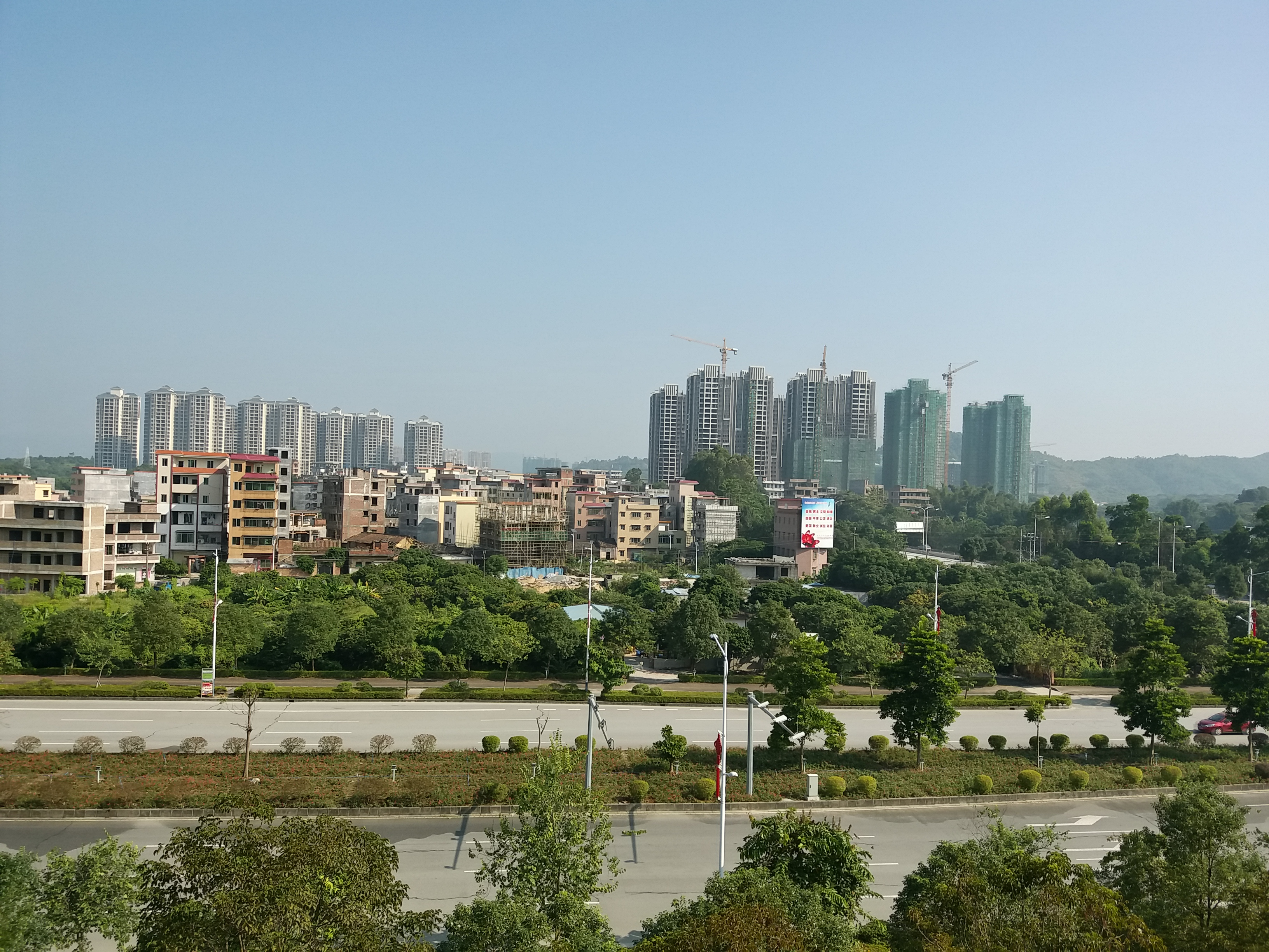 迎宾大道一角